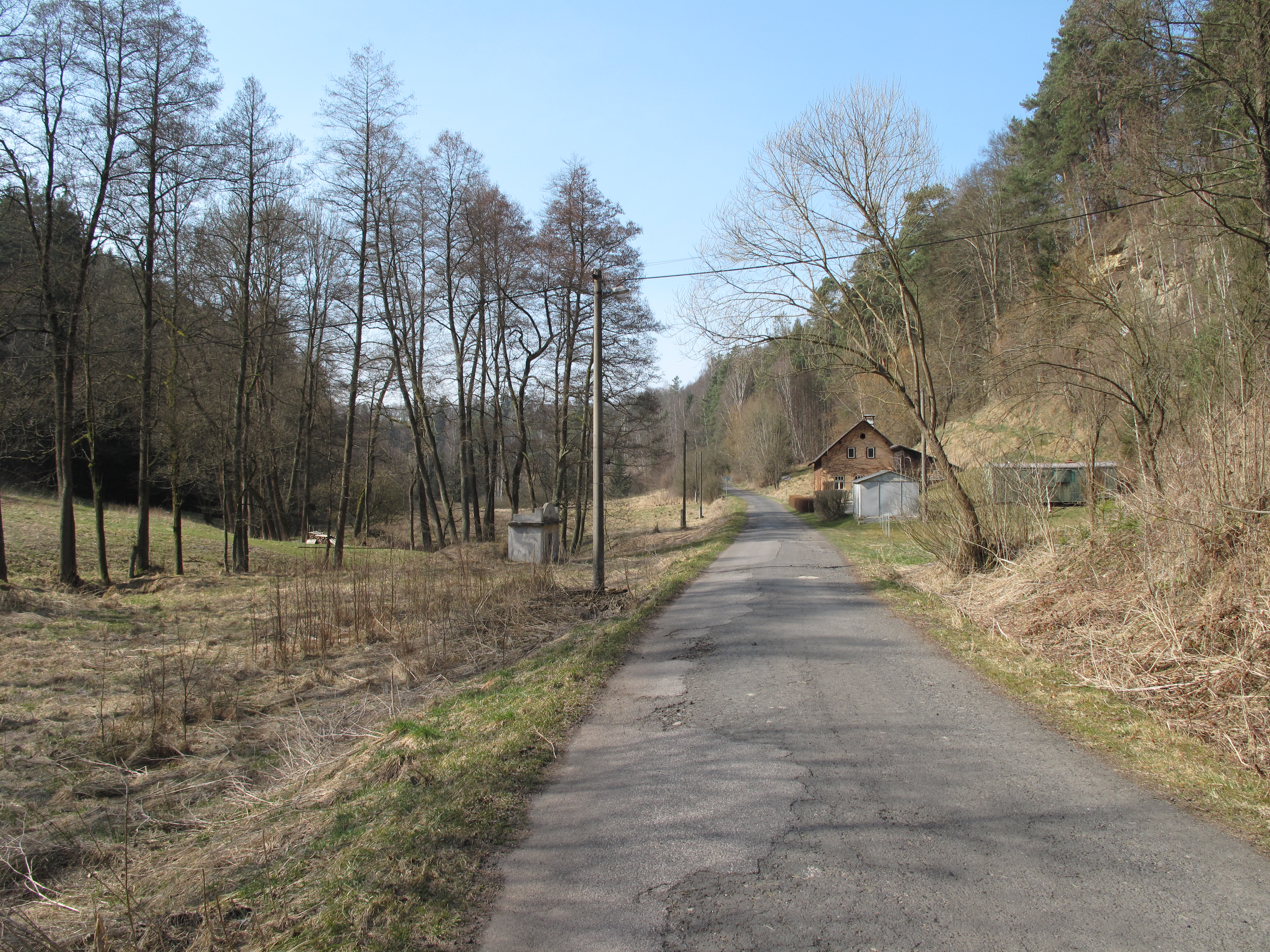 Silnice v Těšnově. Okres Liberec, Česká republika.